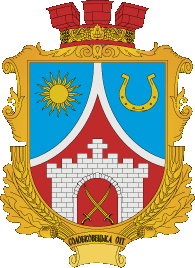 Герб Солобковецької сільської громади